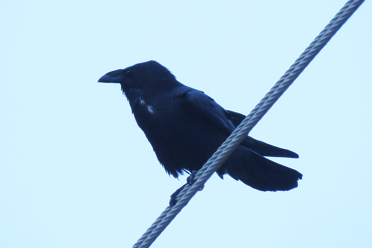 Corvus cryptoleucus 16 mar 16 , Texas